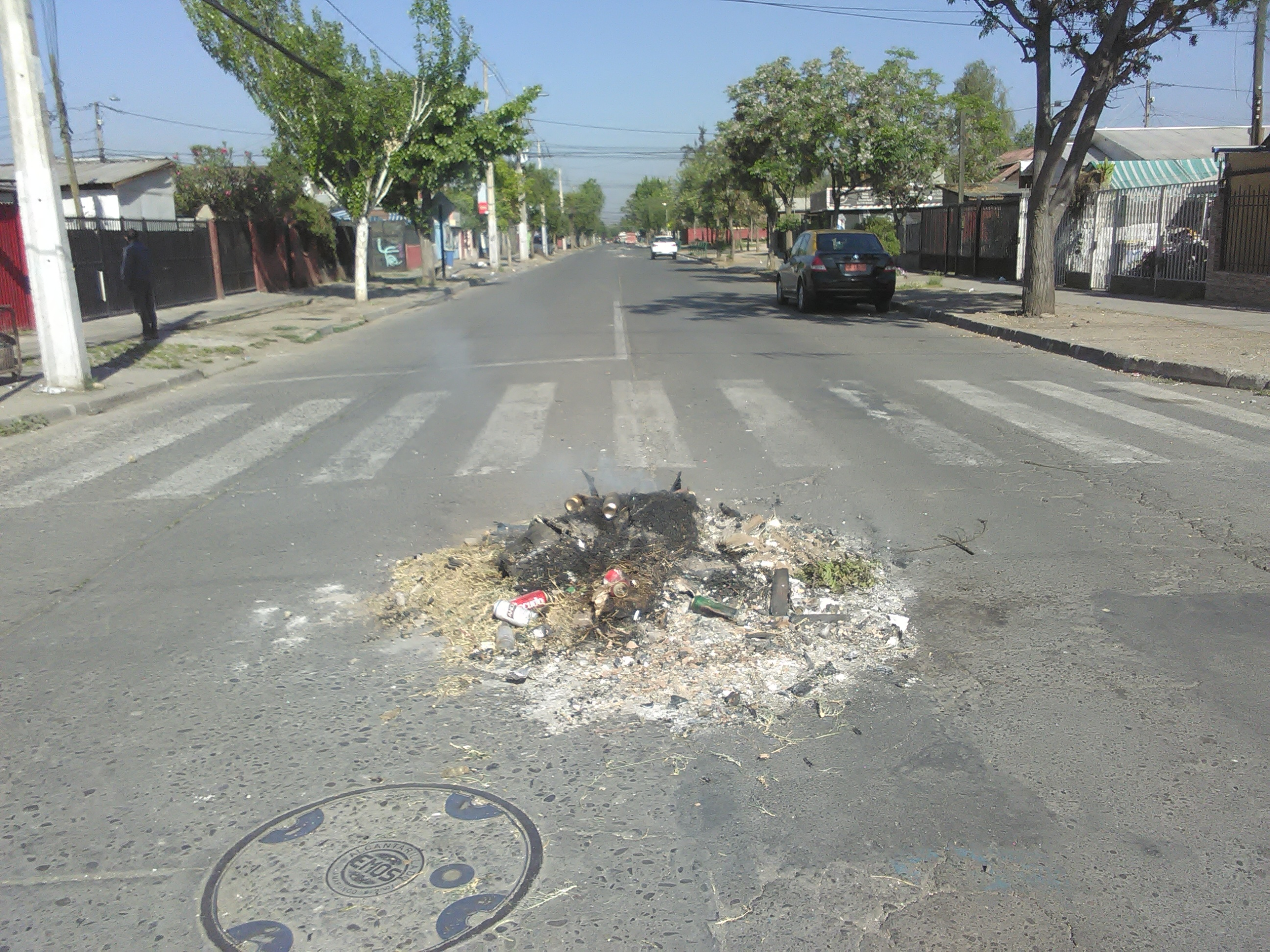 Cenizas de barricadas